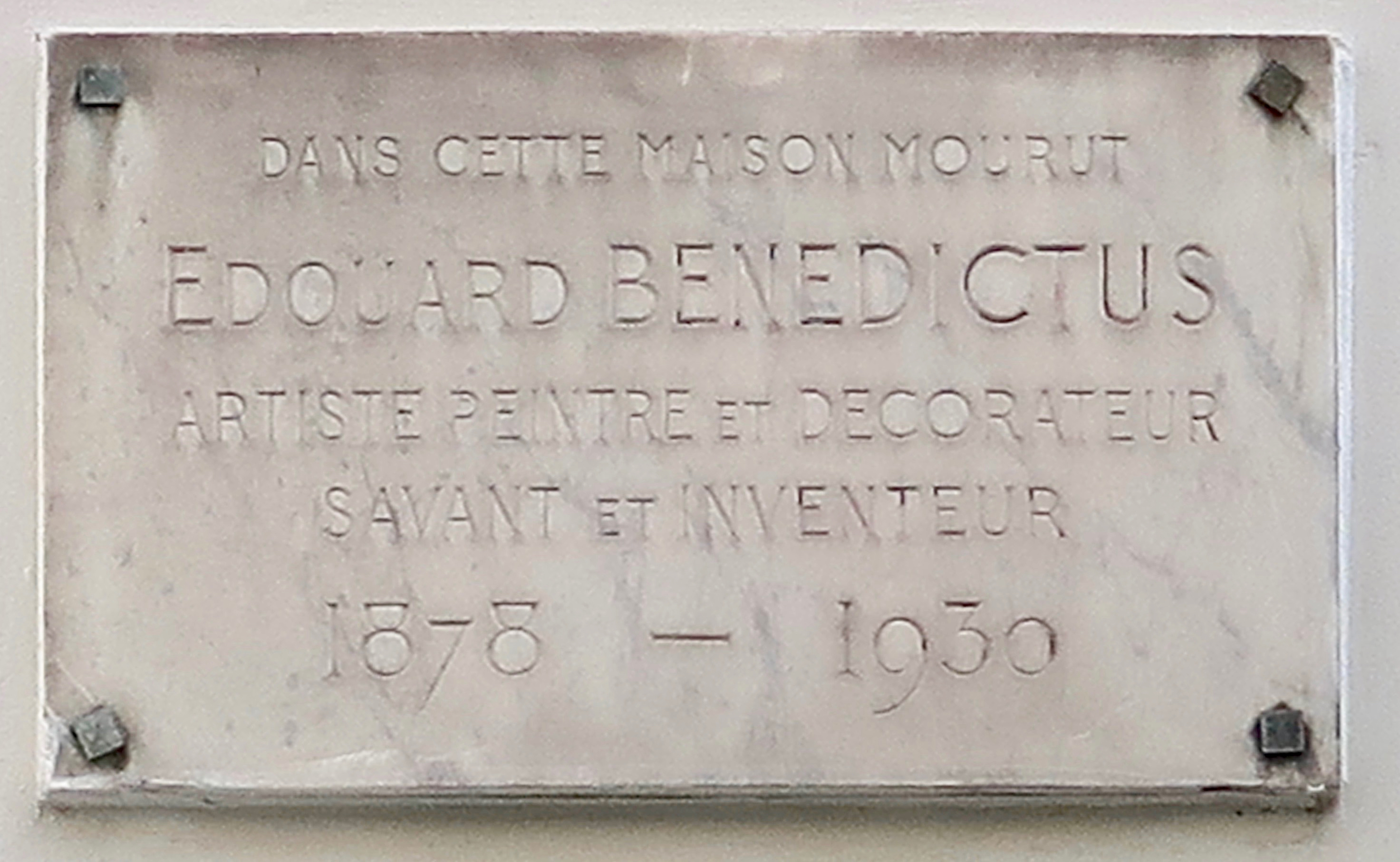 Plaque en hommage à Édouard Bénédictus, 73 rue des Vignes (Paris 16e).